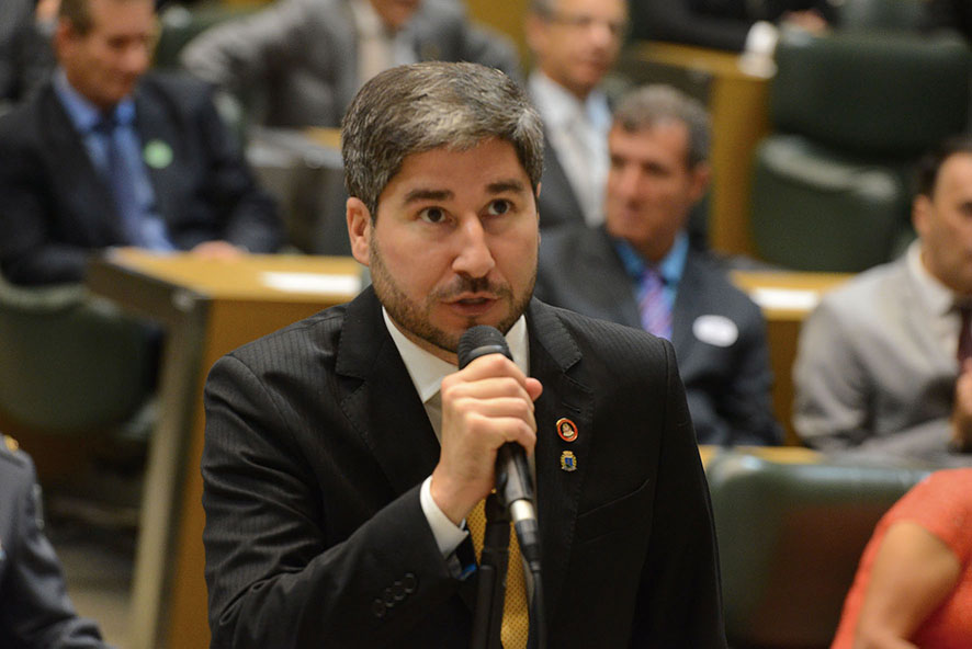 Fernando Henrique Cury é bacharel em direito, produtor rural e político brasileiro, filiado ao Partido Popular Socialista.